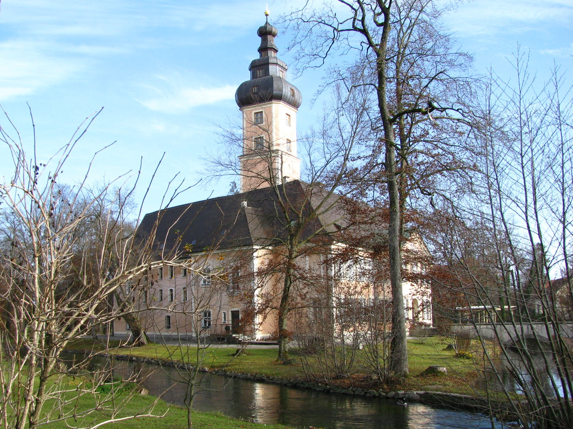 Das Schloss Planegg ist der Sitz der Herren der ehemaligen Hofmark Planegg, wenige Kilometer südwestlich von München. Ansicht von Südwesten im Nov. 2009.